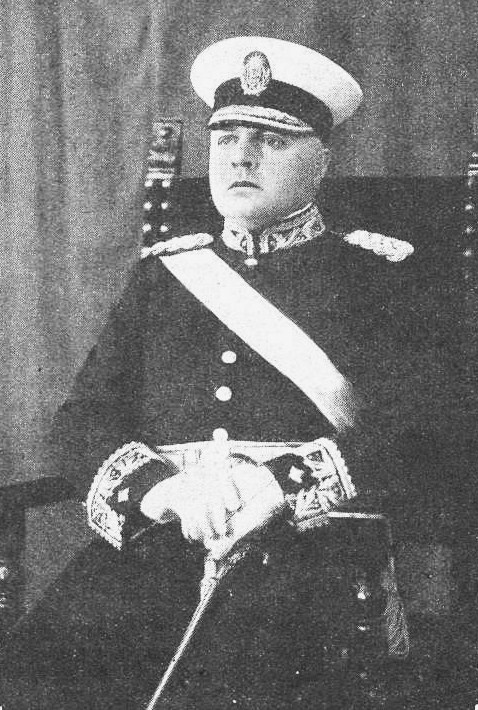 ingeniero argentino (1877-1940)